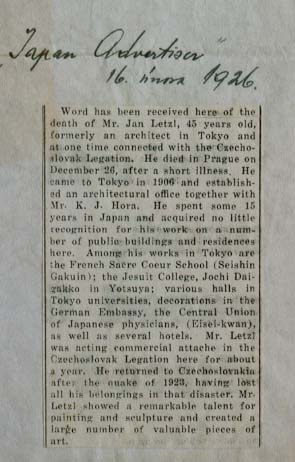 Obituarios de Jan Letzel